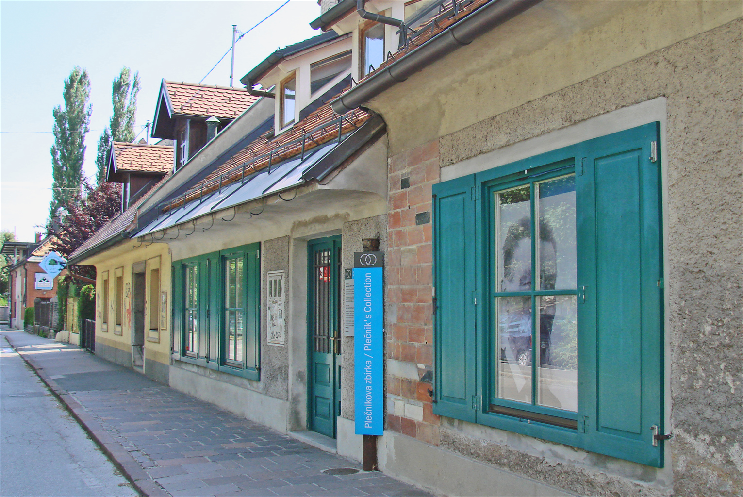 La maison de Plecnik, coté rue Aujourd'hui il s'agit d'un musée d'architecture consacré à l’œuvre de Plečnik Photo Annie Dalbéra Cette maison, achetée en 1915 avec ses frères et sa soeur, a été transformée par Jože Plečnik qui y a vécu dès 1921 et seul la plupart du temps. Il y travaillait et recevait ses étudiants. Il est resté toute sa vie célibataire et a mené une vie ascétique et modeste entièrement consacrée à la création architecturale. En 1924, il a construit une petite tour circulaire dans laquelle il a installé son studio. Il récupérait des matériaux ou éléments non utilisés sur ses chantiers et les intégrait dans la maison. A sa mort, en 1957, la maison a été donnée à la ville qui en a fait un musée d'architecture. Site officiel de la ville